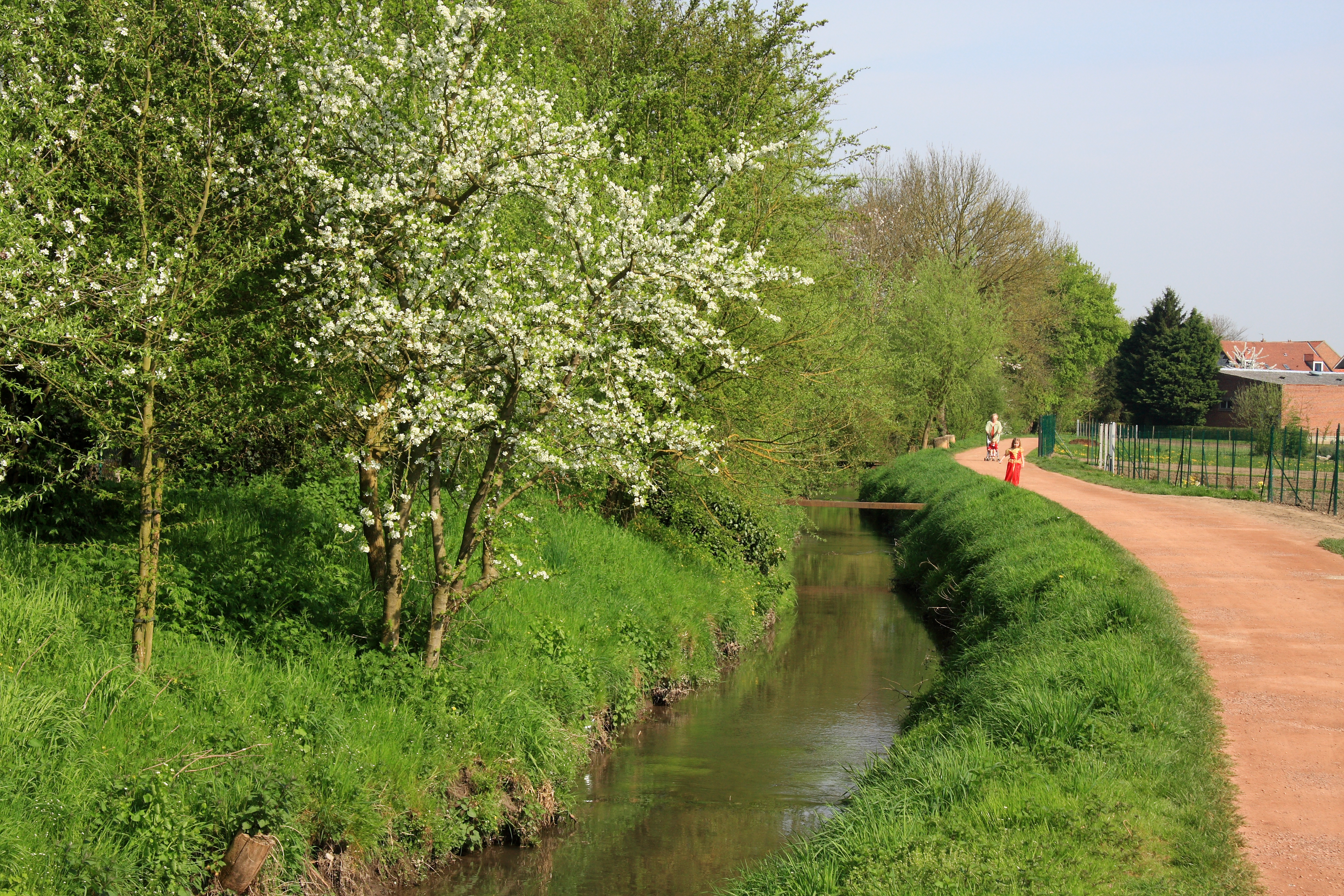 Le long du Crinchon: une très belle promenade